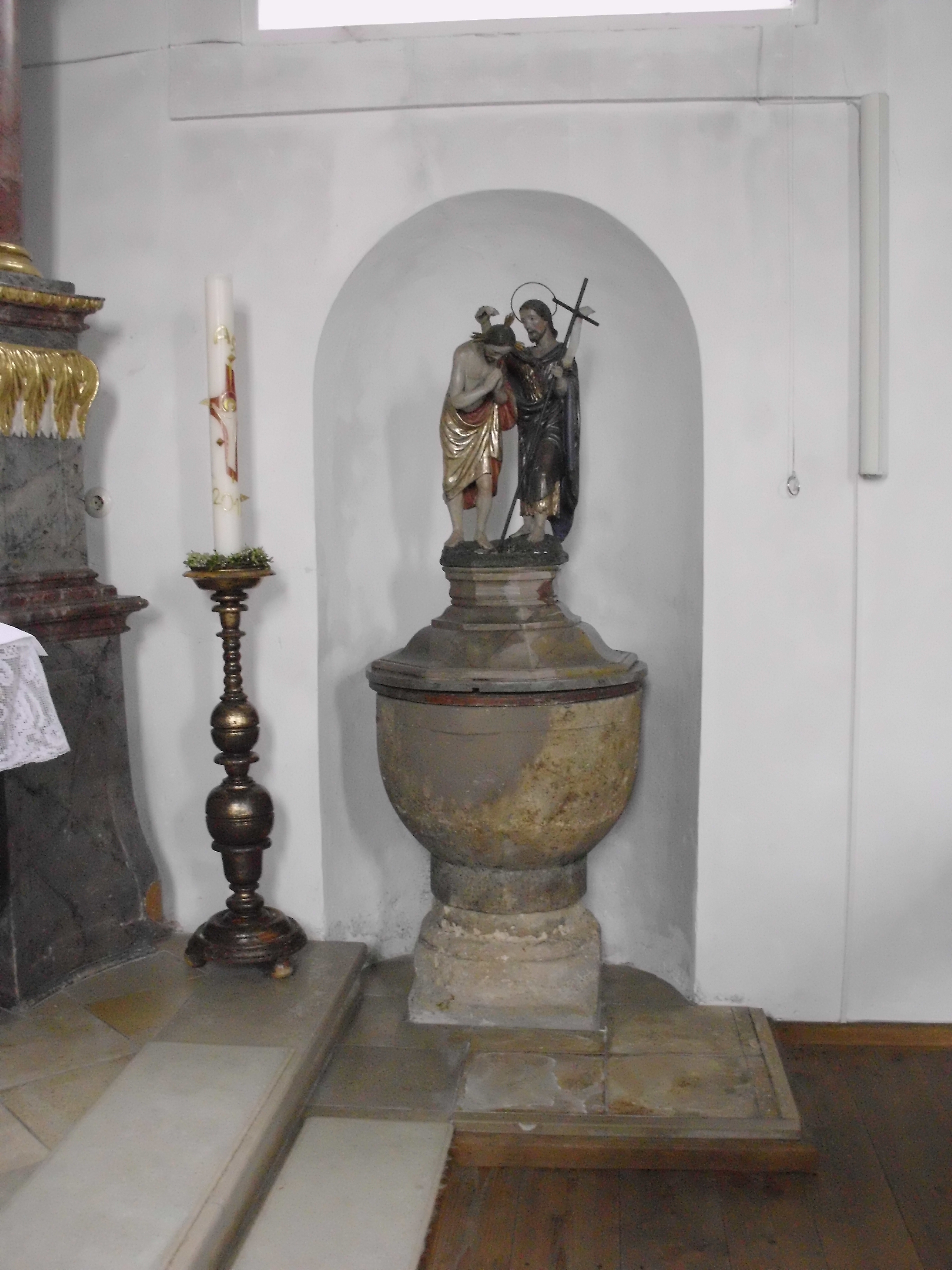 Bergheim, Landkreis Neuburg-Schrobenhausen, Kirche St. Mauritius, Taufstein des 16./17. Jahrhunderts